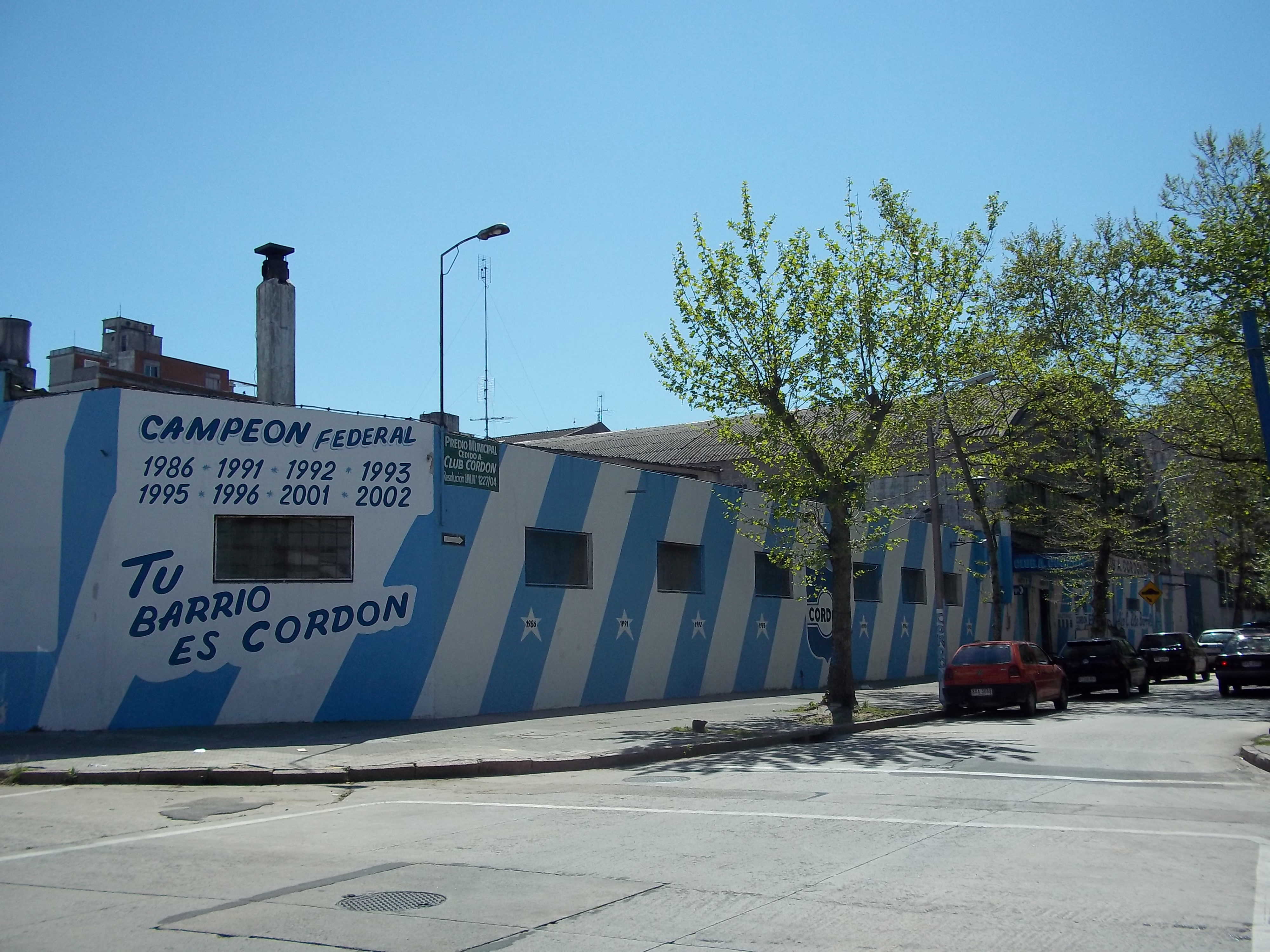 Sede del Club Atlético Cordón, Montevideo, Uruguay.